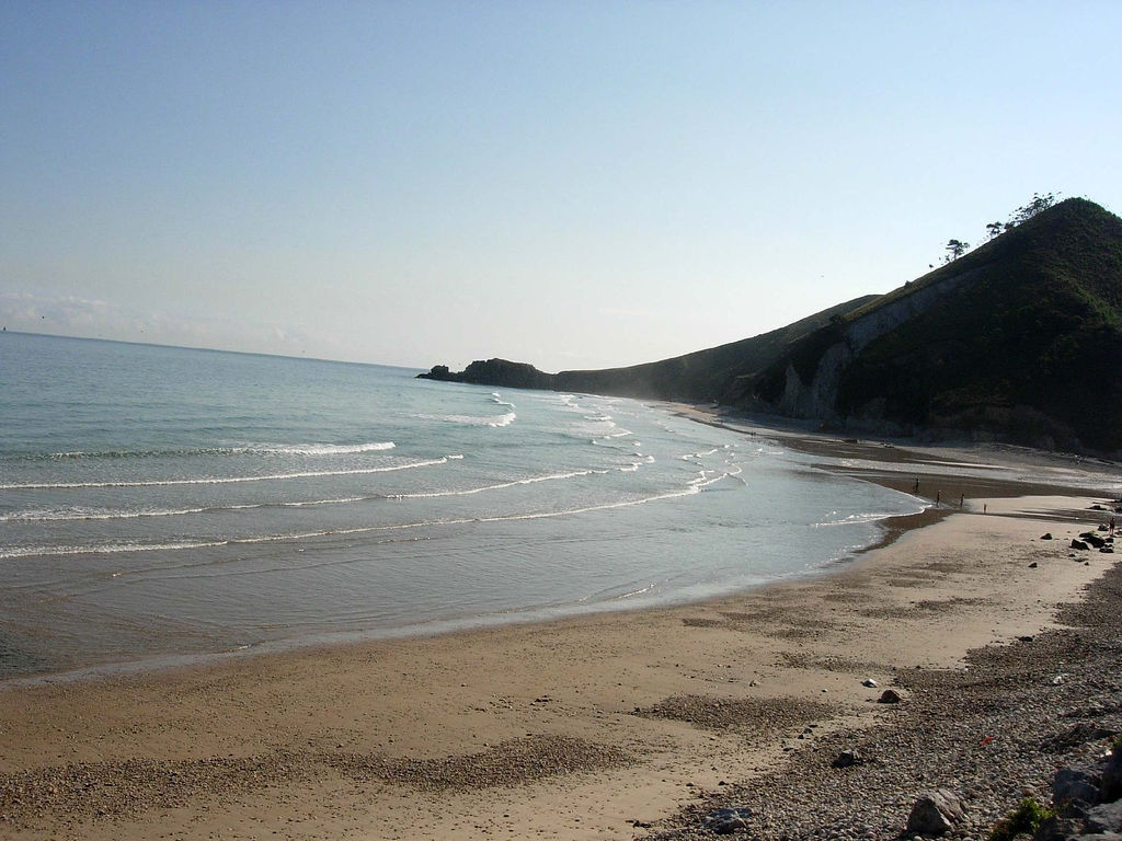 Playa de San Antolín, en Naves (Llanes)